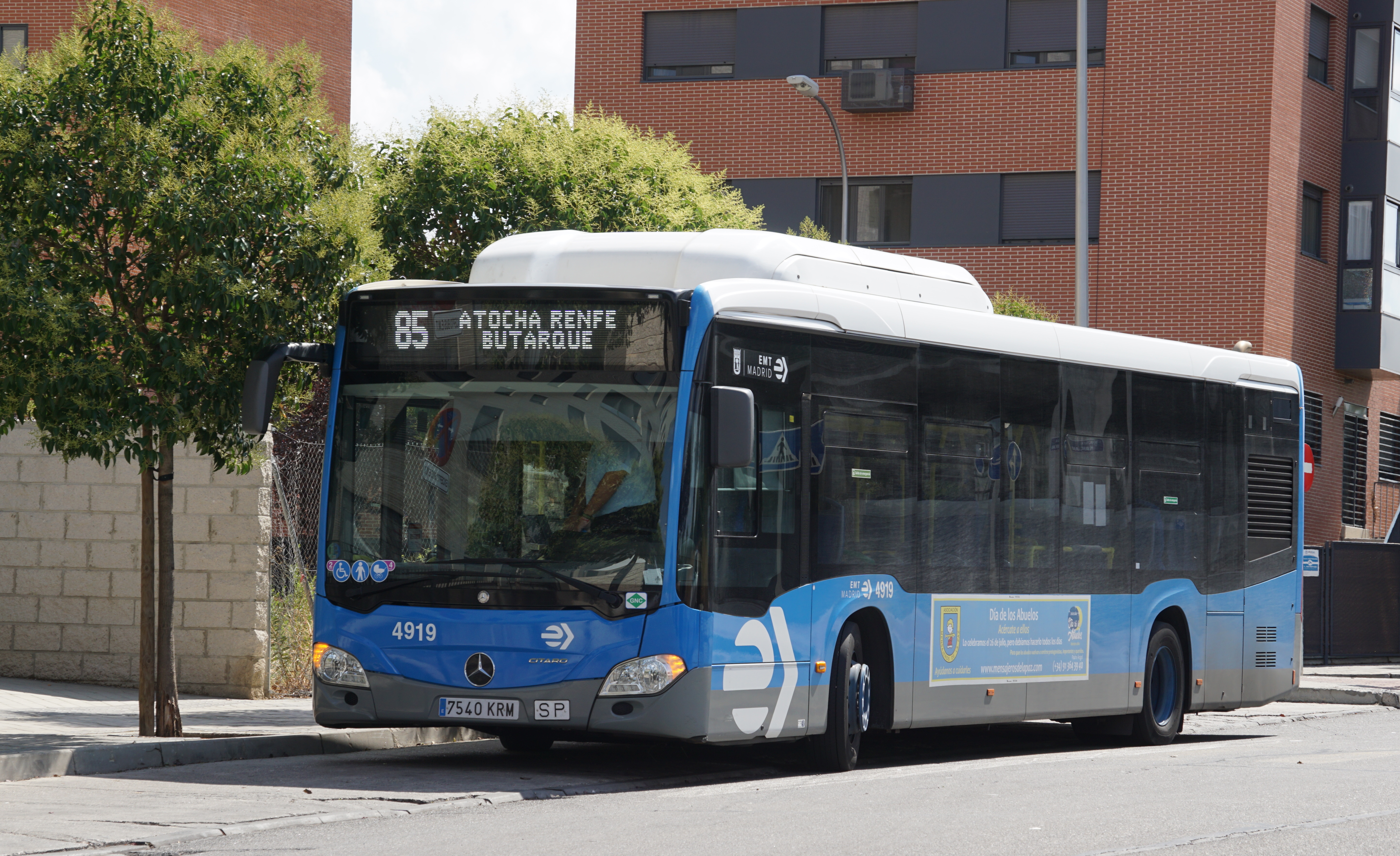 Final de Butarque en la calle de los Llanos, agosto 2020